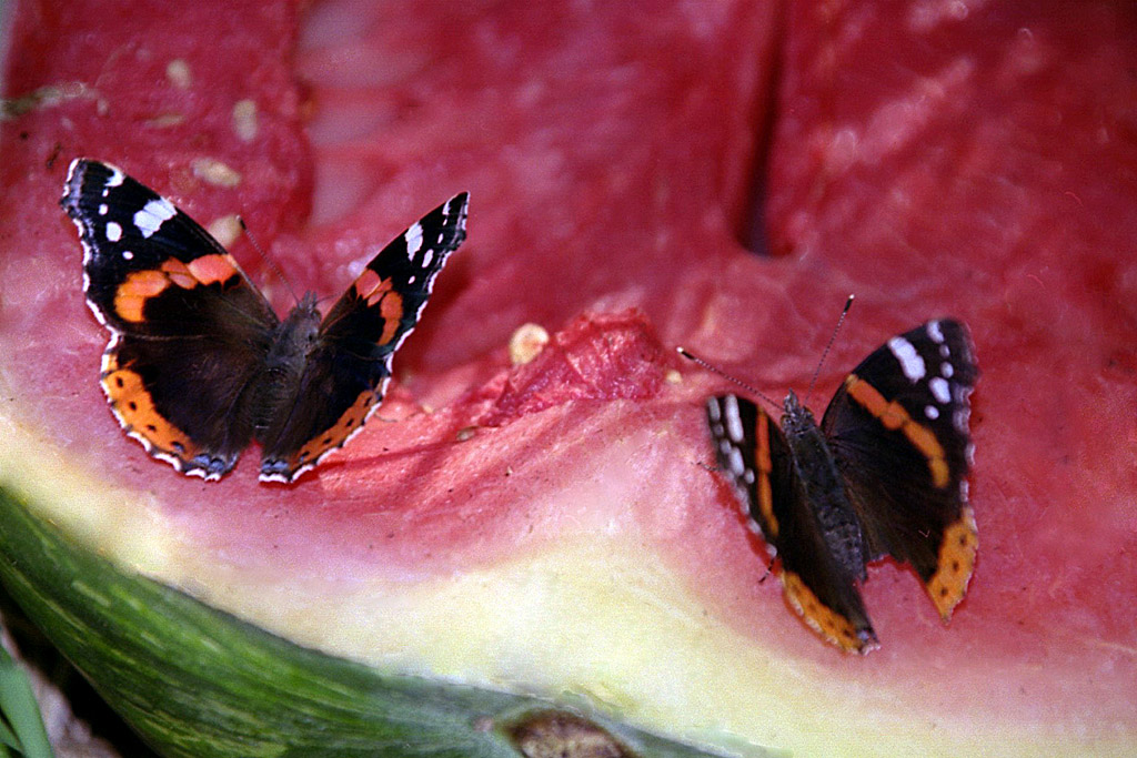 Vanessa atalanta Das Foto wurde von mir im Sommer 2000 in Hamburg auf dem Obstmarkt fotografiert.Autor:Dieter Weiher(selbst).Aufnahme mit Spiegelreflex Minolta Dynax7000si,Objektiv Sigma Aspherical Macro 80mm,Film Fuji ASA 400.